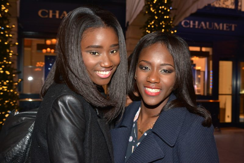 Dîner des révélations des César du cinéma Depicted people: Karidja Touré and Assa Sylla AnnotationsThis image is annotated: View the annotations at Commons